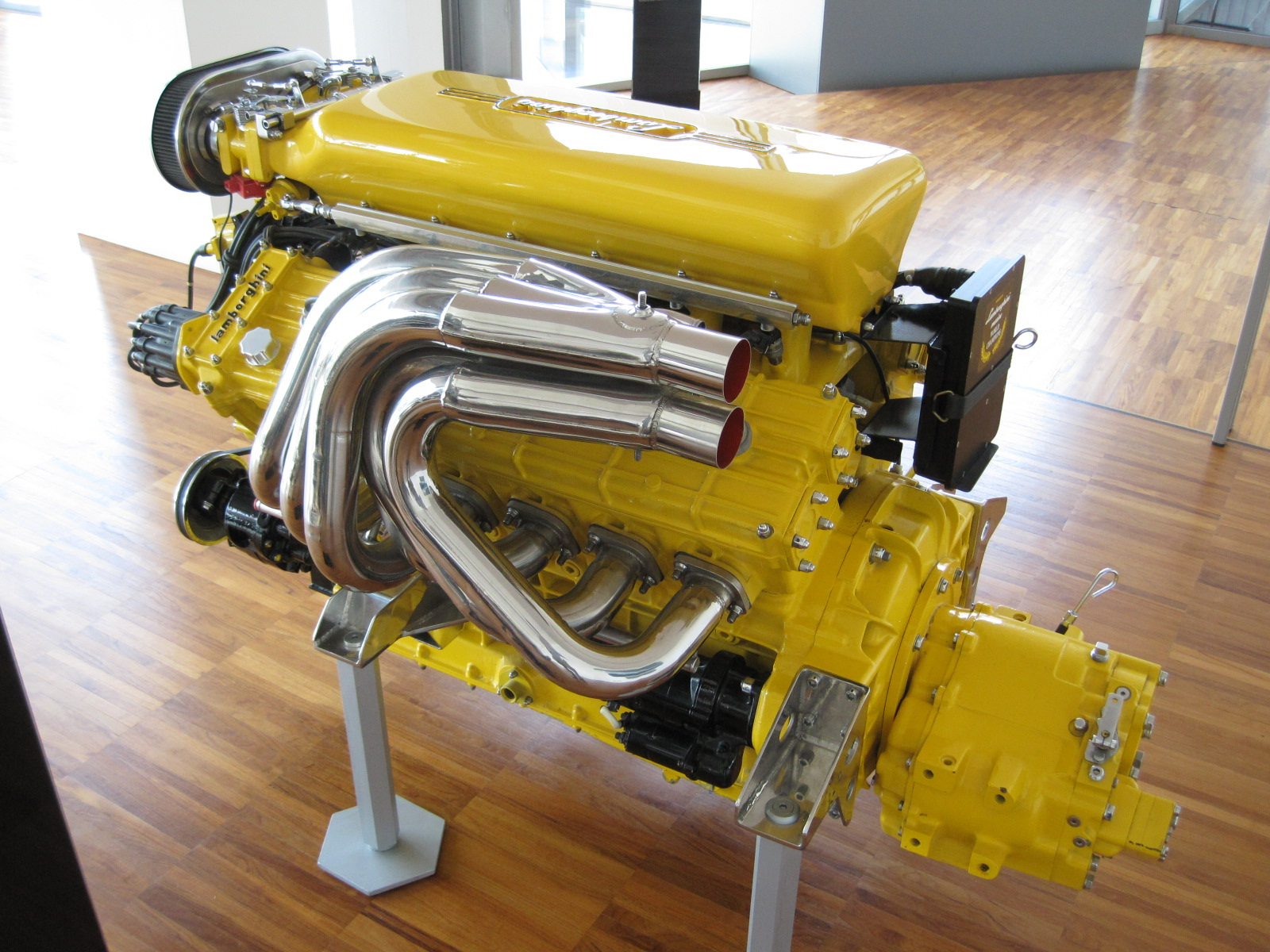 Musée Lamborghini - Moteur L 900 I - V12 - 9,3 Litres - 1993